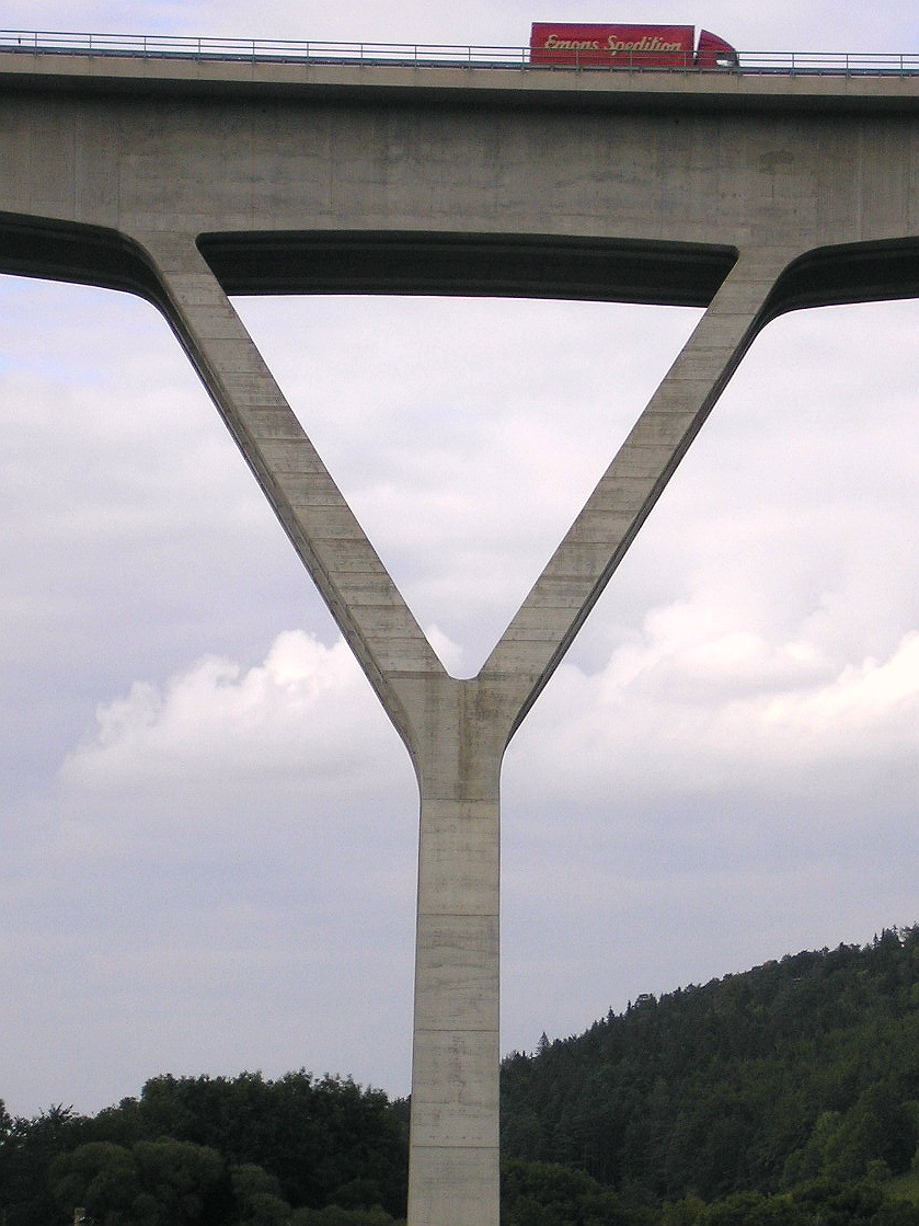 Ein Y-förmiger Brückenpfeiler der Talbrücke Zahme Gera (A71) bei Ilmenau in Thüringen